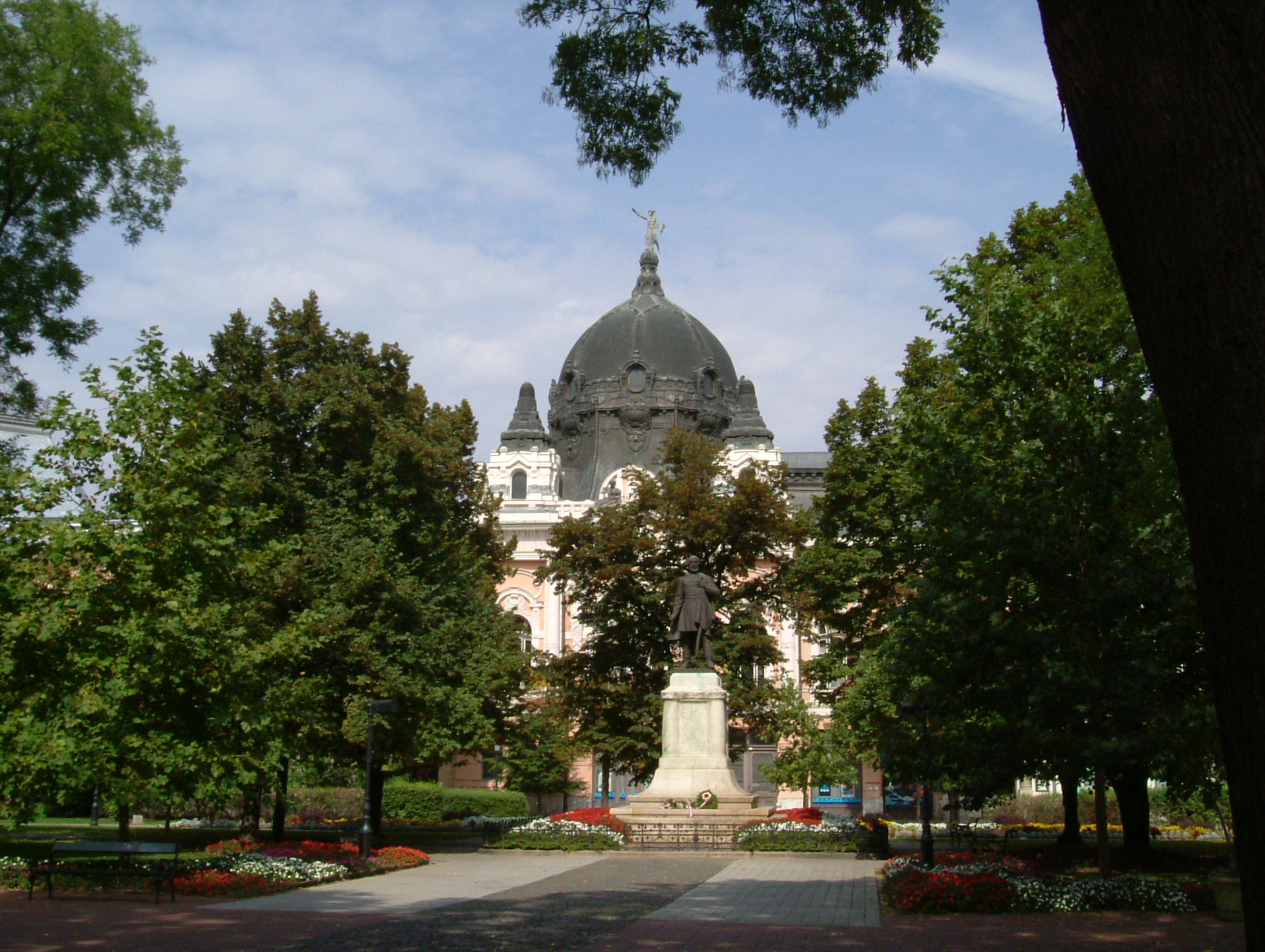 Hódmezővásárhely-Magyar Hitel Bank